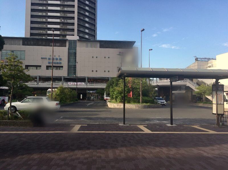 南海高野線北野田駅前の様子